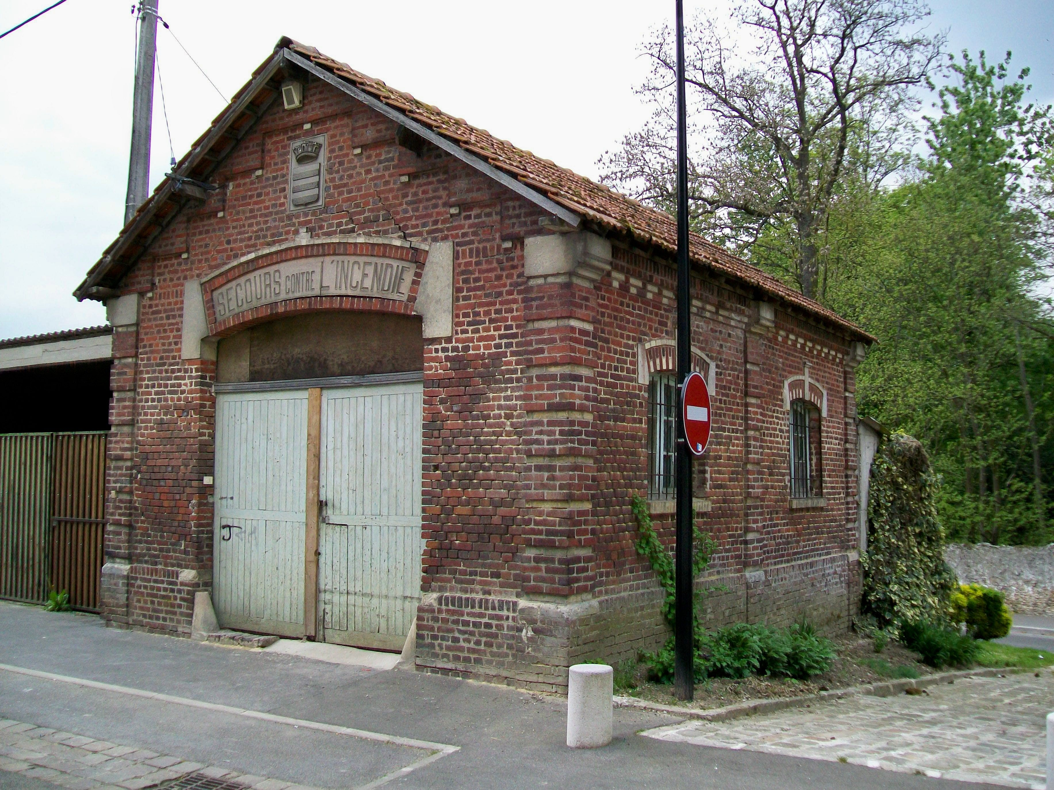 L'ancienne remise pour la pompe à incendie, rue du Jeu d'arc. Elle date des années 1880 est est utilisé aujourd'hui comme débaras par les services techniques de la mairie.